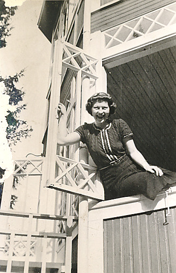 Näyttelijä Liisa Nevalainen Helsingin Pitäjänmäellä vuonna 1939.